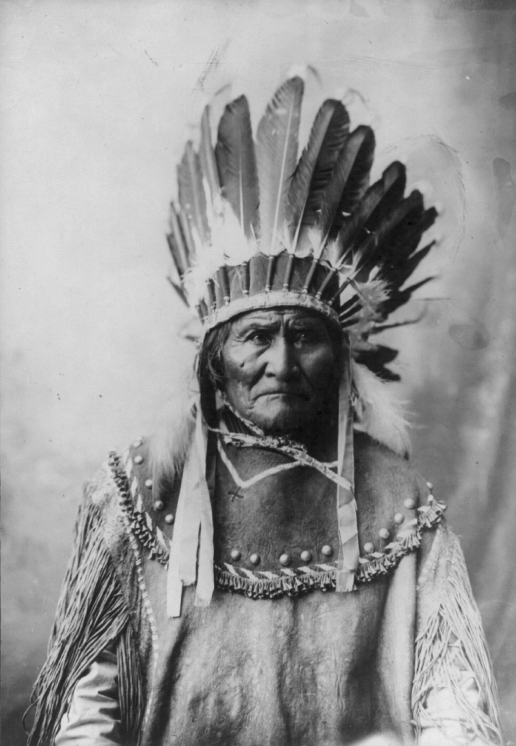 Geronimo